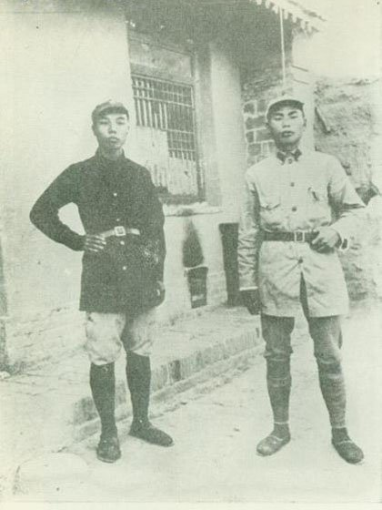 1936年，萧华（红二师政委）与杨得志（师长）在甘肃宁县早胜镇